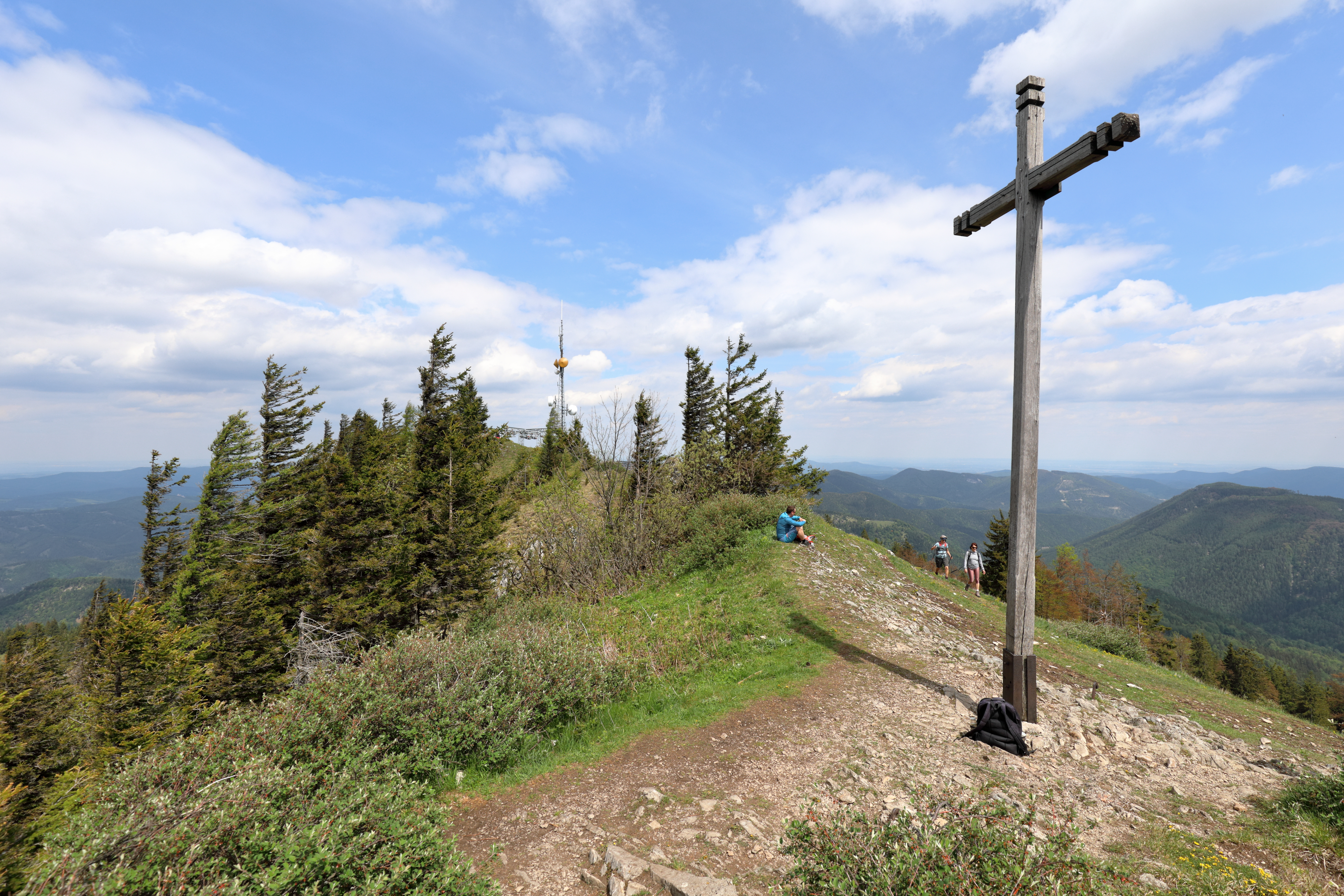 Blick von Südwesten über den Gipfelbereich des 1342 m hohen Unterbergs mit dem Gipfelkreuz im Vordergrund. Der Gipfel befindet sich auf dem Gemeindegebiet der niederösterreichischen Gemeinde Muggendorf und direkt an der Gemeindegrenze zu Rohr im Gebirge.